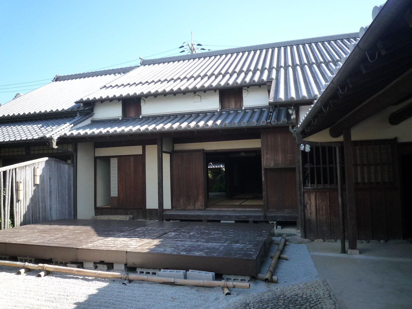 泉佐野駅近くの旧民家（市指定文化財）H25.10撮影